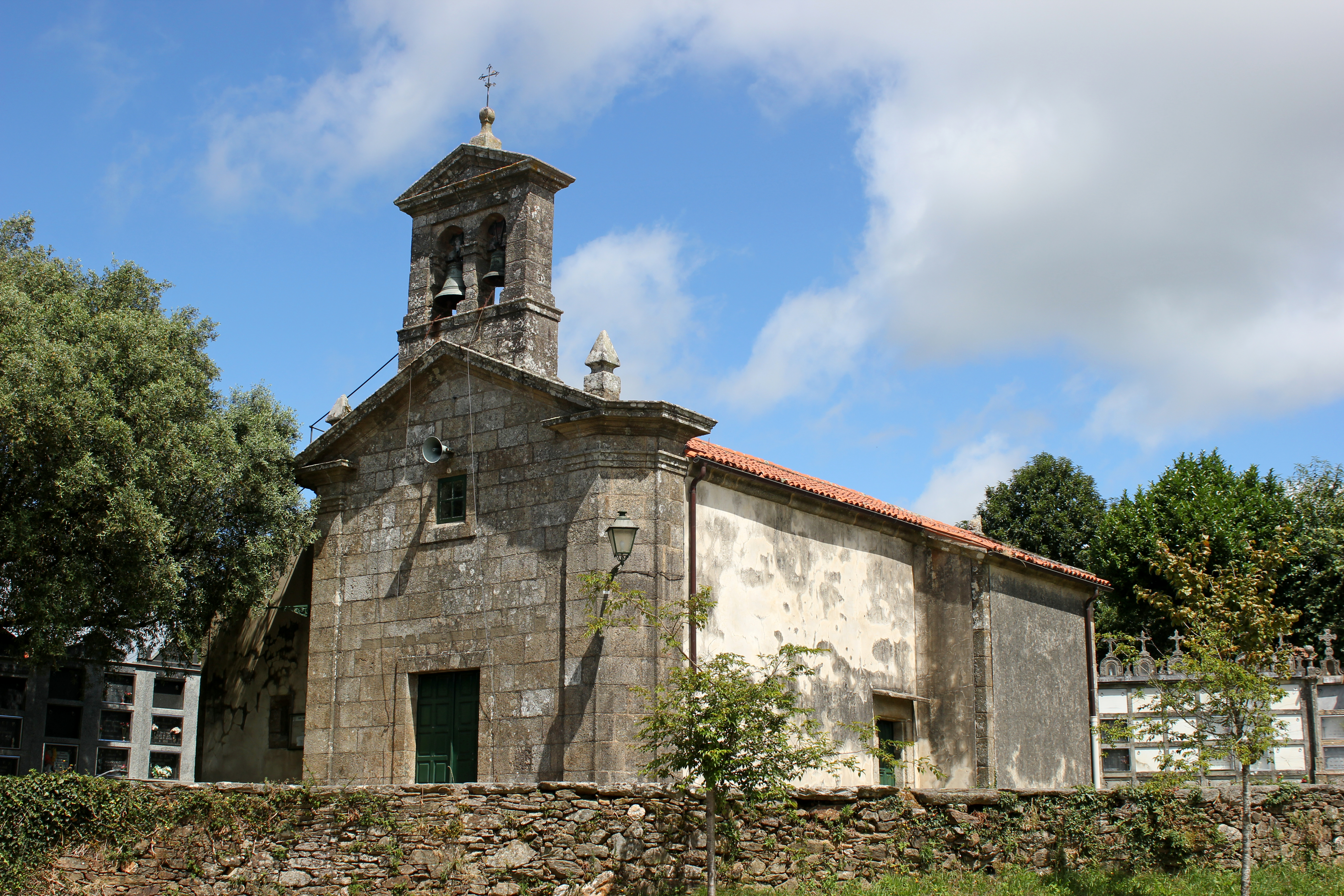 Igrexa de Verdía, Santiago de Compostela.